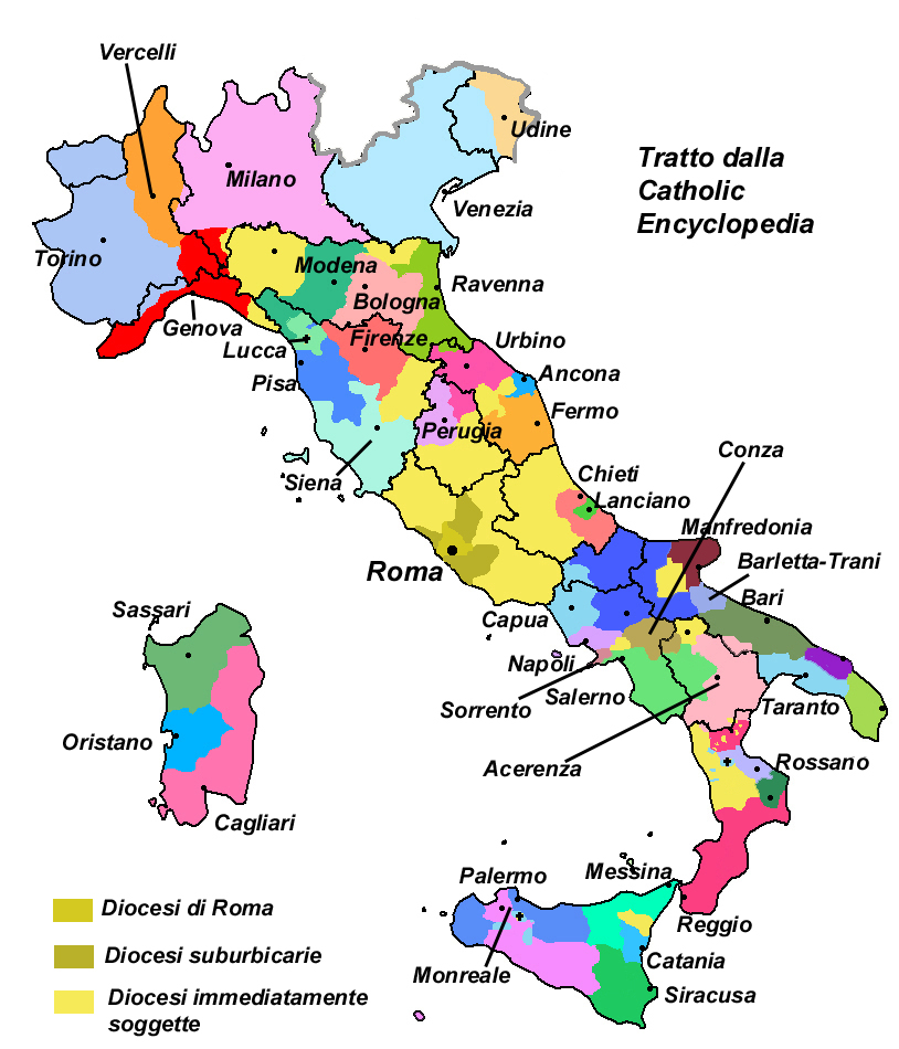 Province ecclesiastiche nel Regno d'Italia tra il 1915 e il 1918